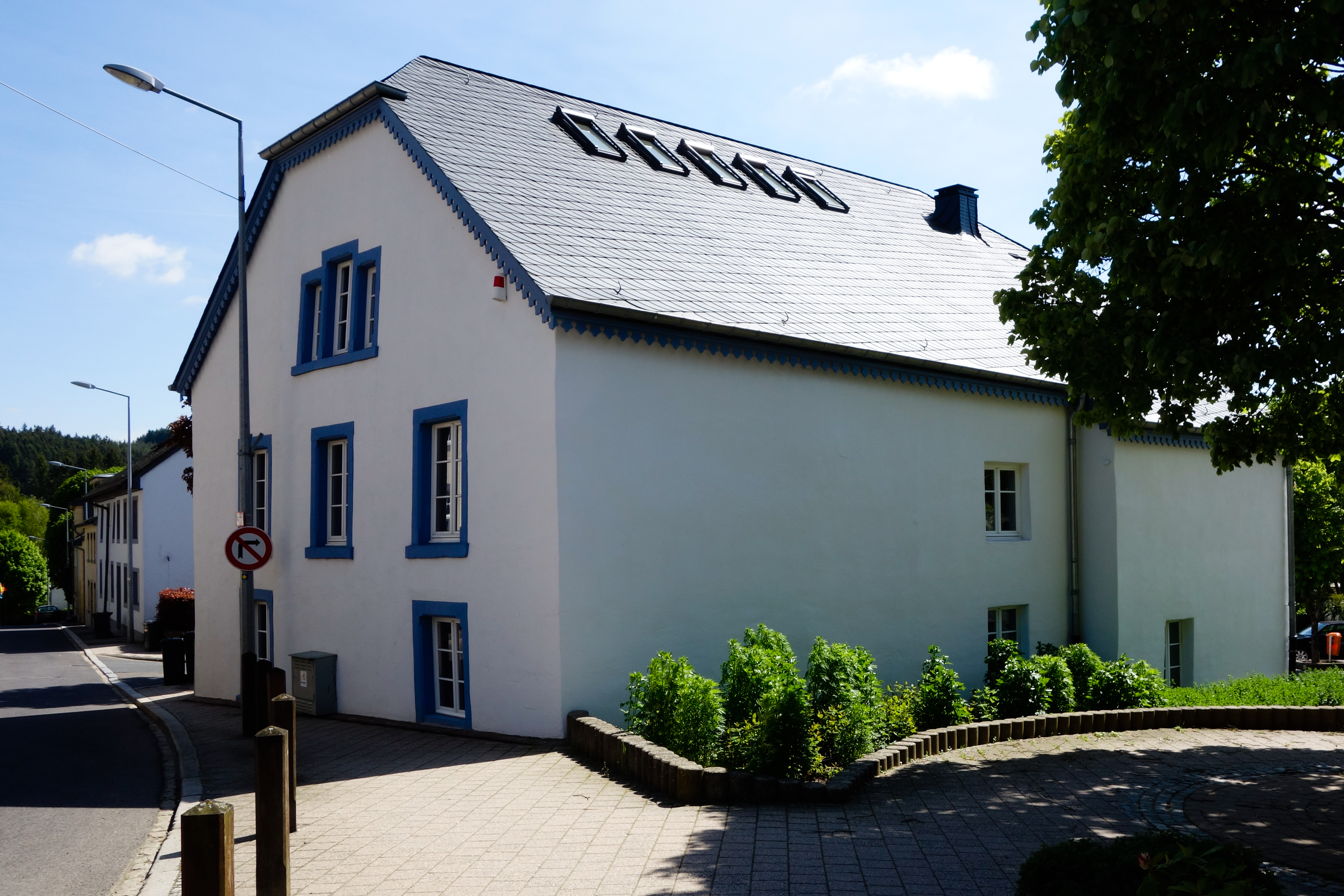 D'Schuddenhaus zu Ëlwen